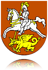 Erb obce Prievaly